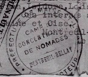 tampon sur un document administratif (certificat de libération d'internés) du 23 janvier 1943 signé par le directeur du « camp de concentration de nomades de Montreuil-Bellay ». Extrait d'un scan des archives départementales du Maine-et-Loire publié par Jacques Sigot sur son blog.